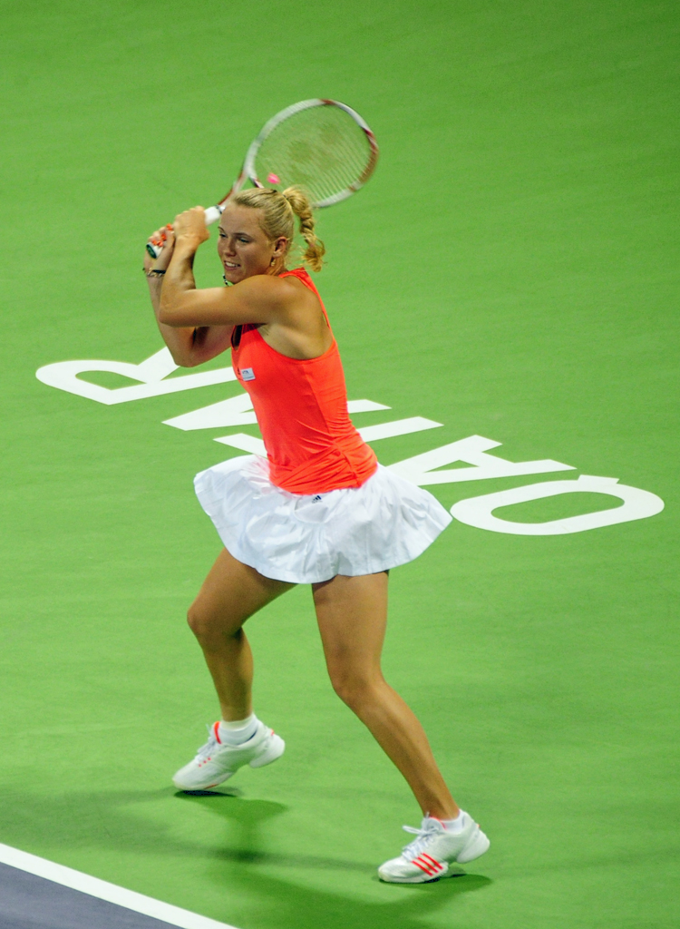 Caroline Wozniacki. Doha, February 26, 2011.